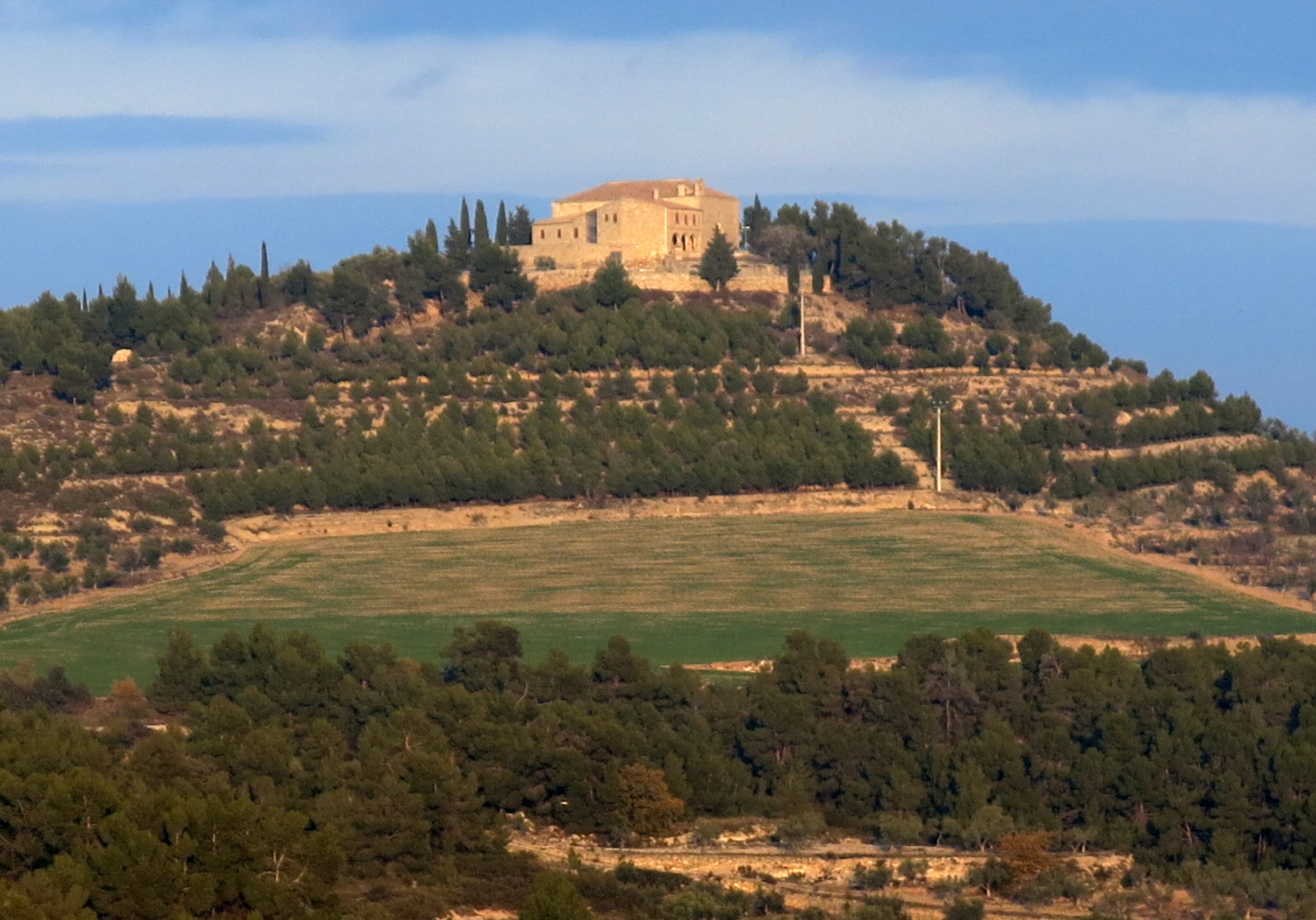 Ermita de la Bovera (Guimerà)